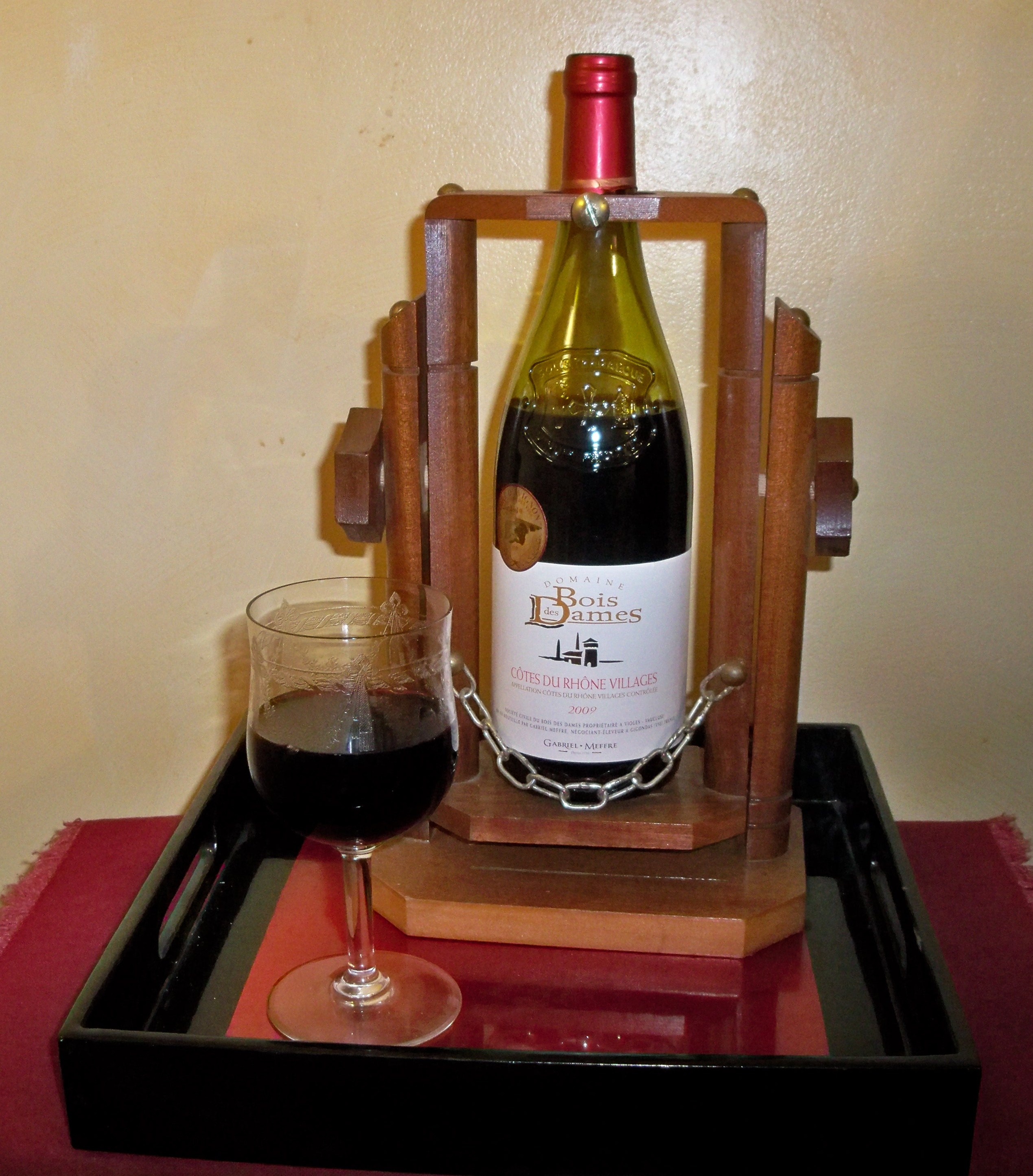 bouteille de Bois de Dames, Plan de Dieu, Vaucluse, France